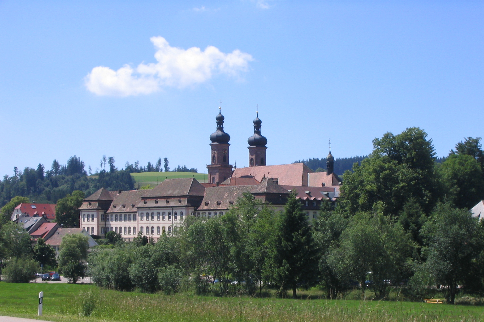 St. Peter im Hochschwarzwald